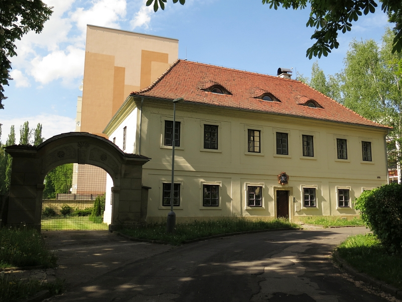 Fara, Kostelní 175, Štětí.